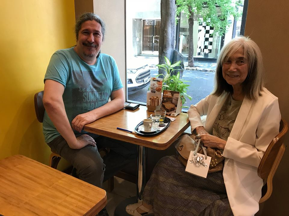 Alejandro Pose Mayayo y María Kodama: desayuno y charlas informales en Buenos Aires